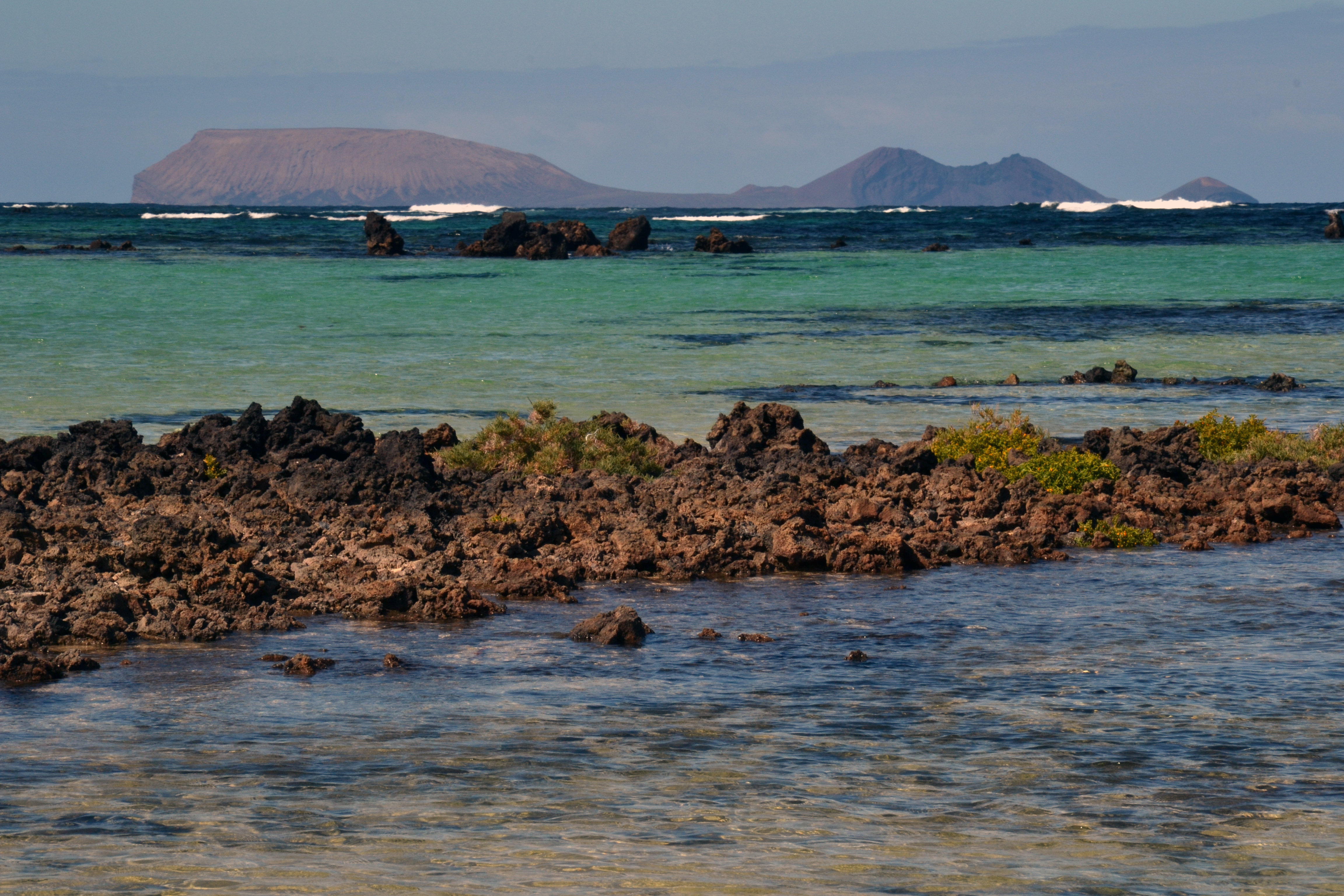 Alegranza, Nördlichste der Kanarischen Inseln, unbewohnt - Blick von Lanzarote